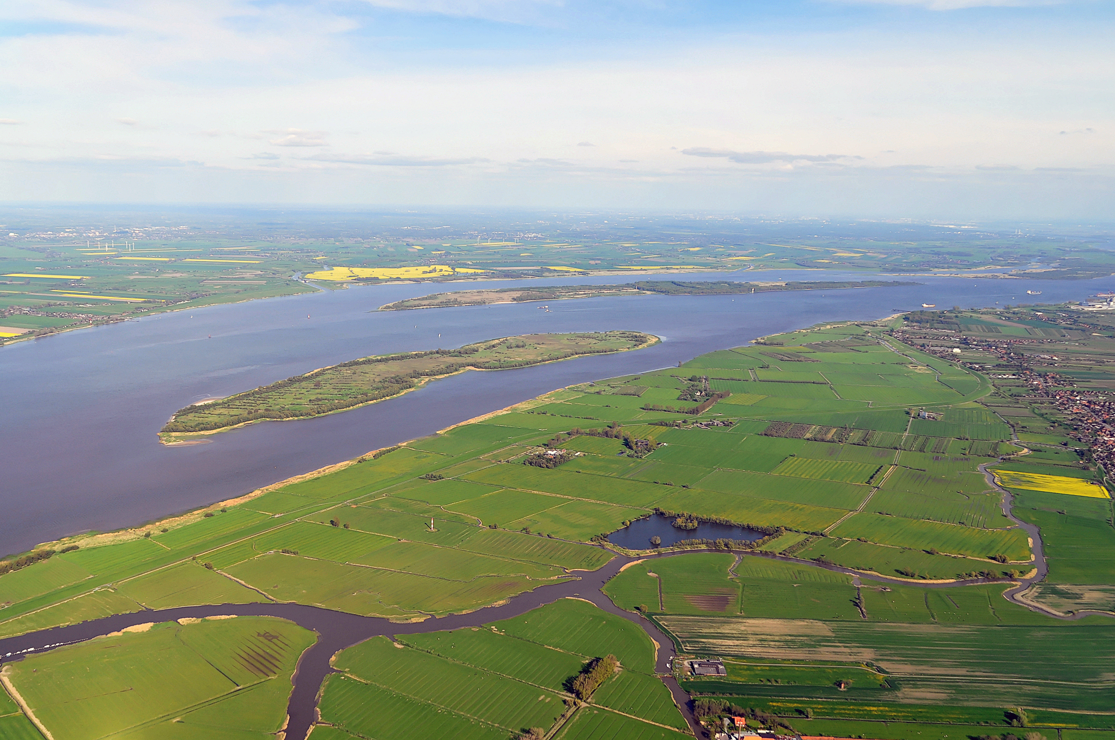 Luftbilder von der Nordseeküste 2012-05